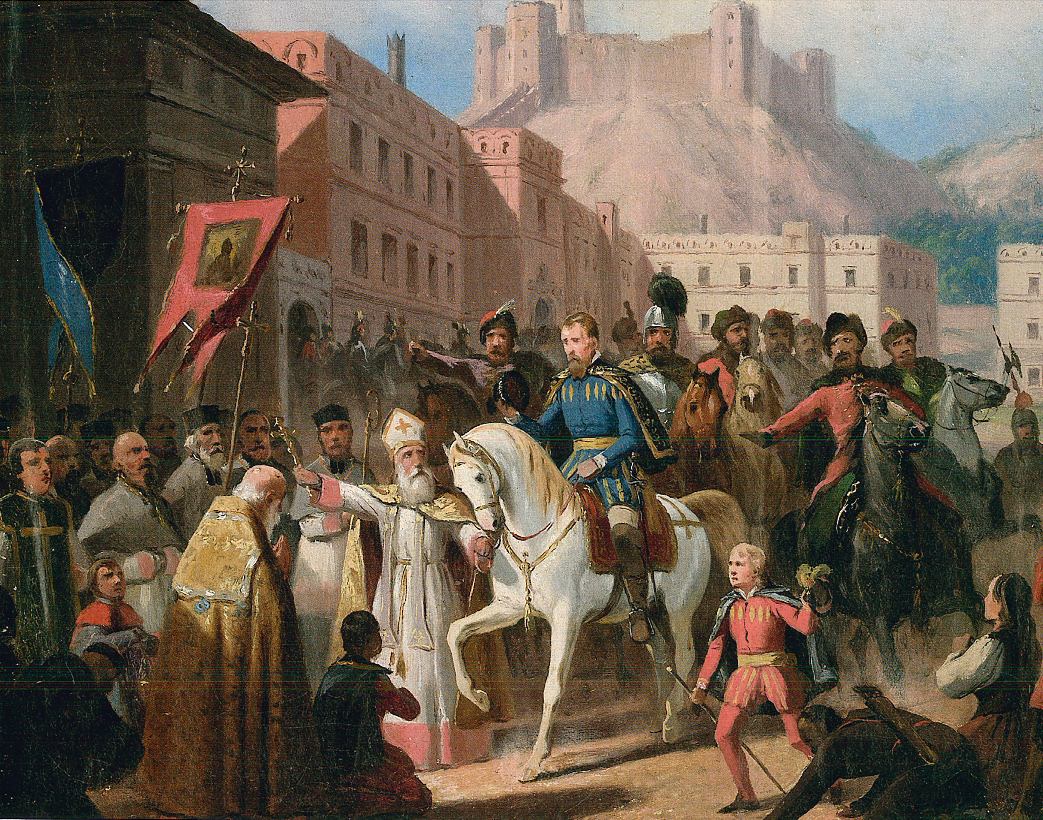 Беларуская (тарашкевіца): Вільня (Vilnia), Дольны (Dolny zamak) і Горны замкі (Horny zamak). Біскуп Паўла Гальшанскага (Pavał Halšanski) забараняе вялікаму князю Жыгімонту Аўгусту (Žygimont Aŭgust) зайсьці ў кальвінскі збор